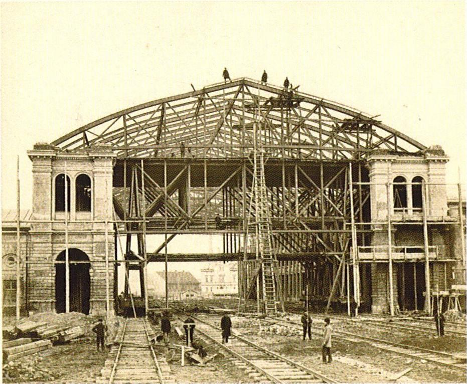 Wien (Österreich) Nordwestbahnhof, Bahnhofshalle in Konstruktion.